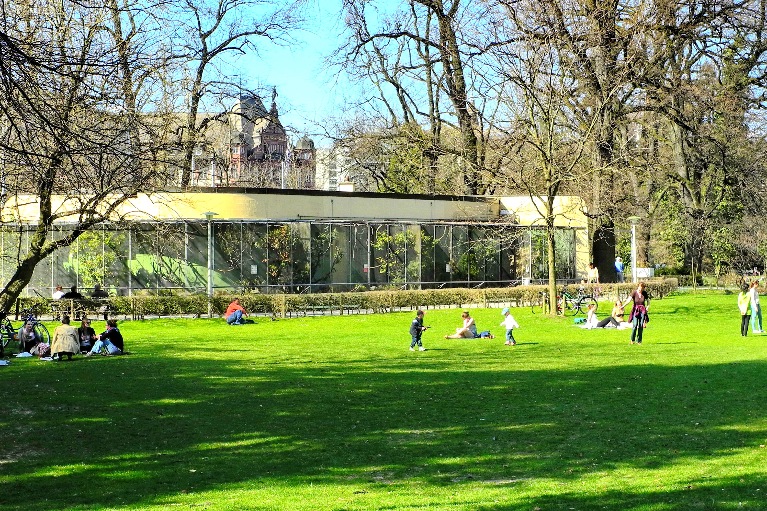 Arboretum in Zürich-Enge (Switzerland)